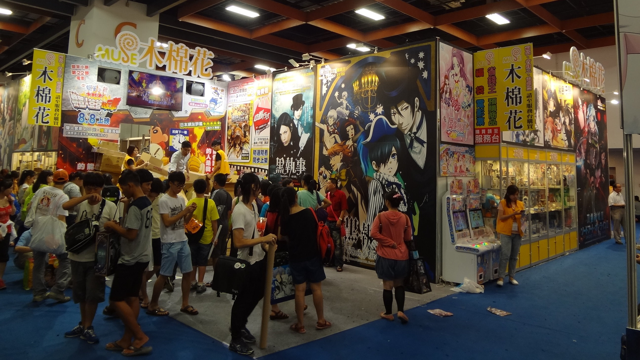 中文（台灣）: 2014年（第15屆）漫畫博覽會木棉花國際攤位。